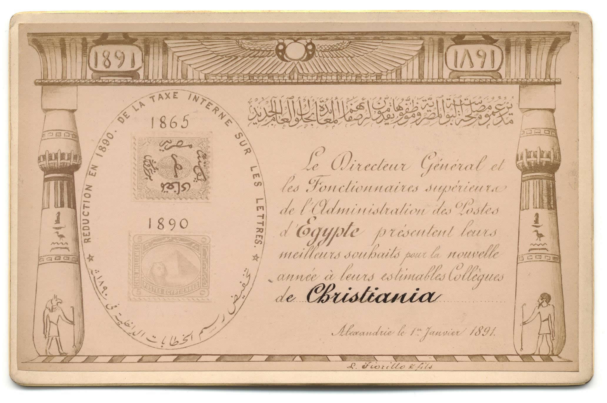 New Year card/Nyttårskort fra Egypt 1891. I arkivet etter Samferdselsdepartementet, Poststyret, 1. postadministrasjonskontor.